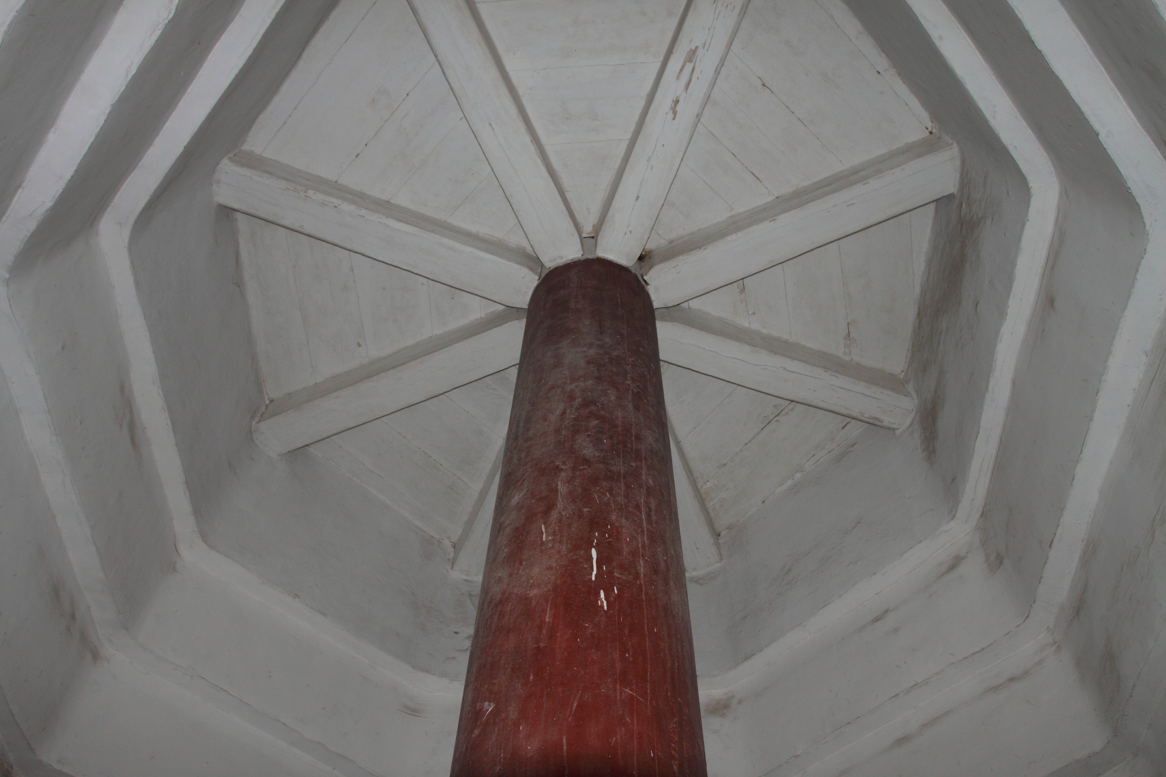 六和塔顶层心柱，位于中国浙江省杭州市。